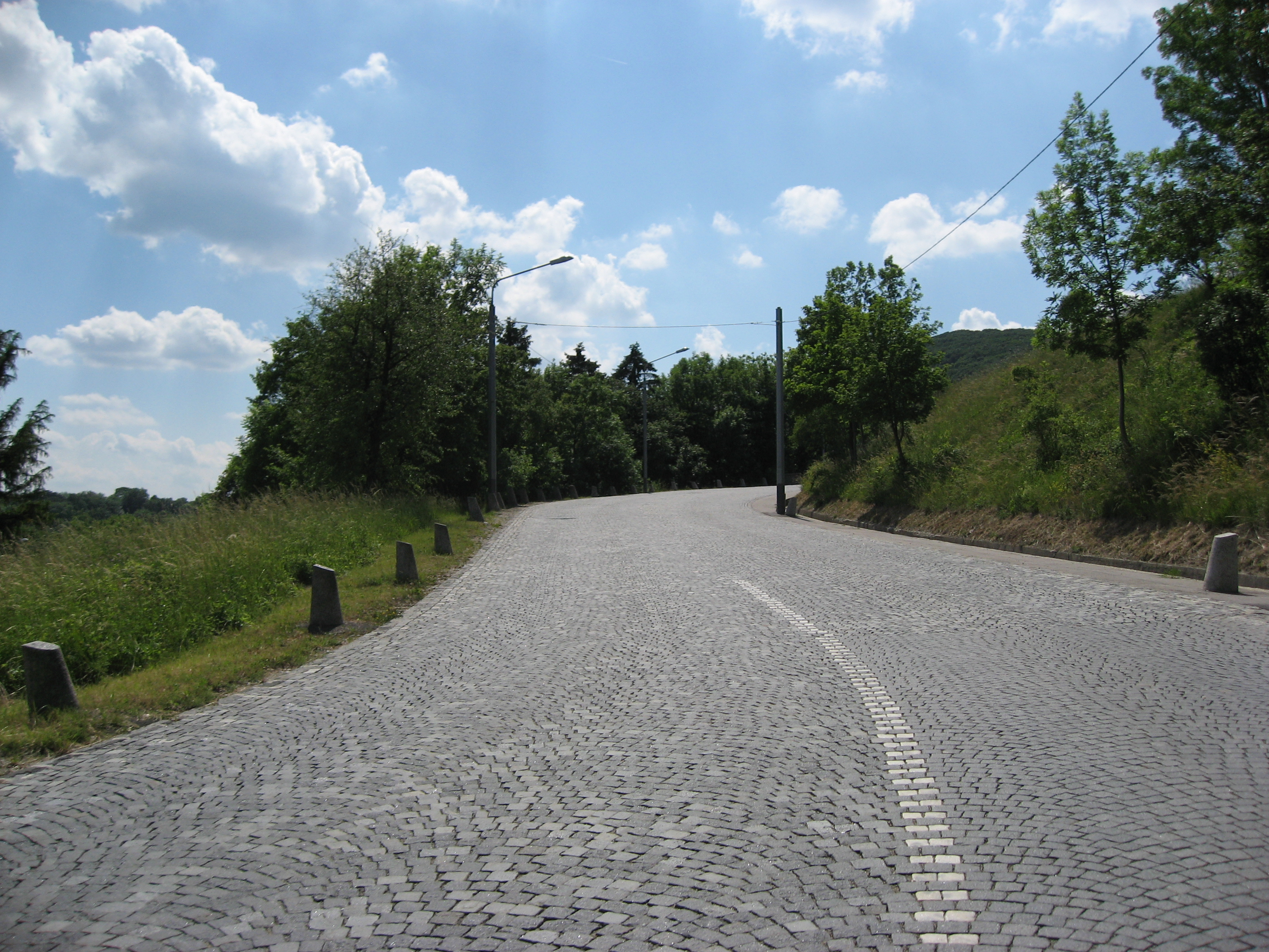 Höhenstraße between Cobenzl and Kahlenberg